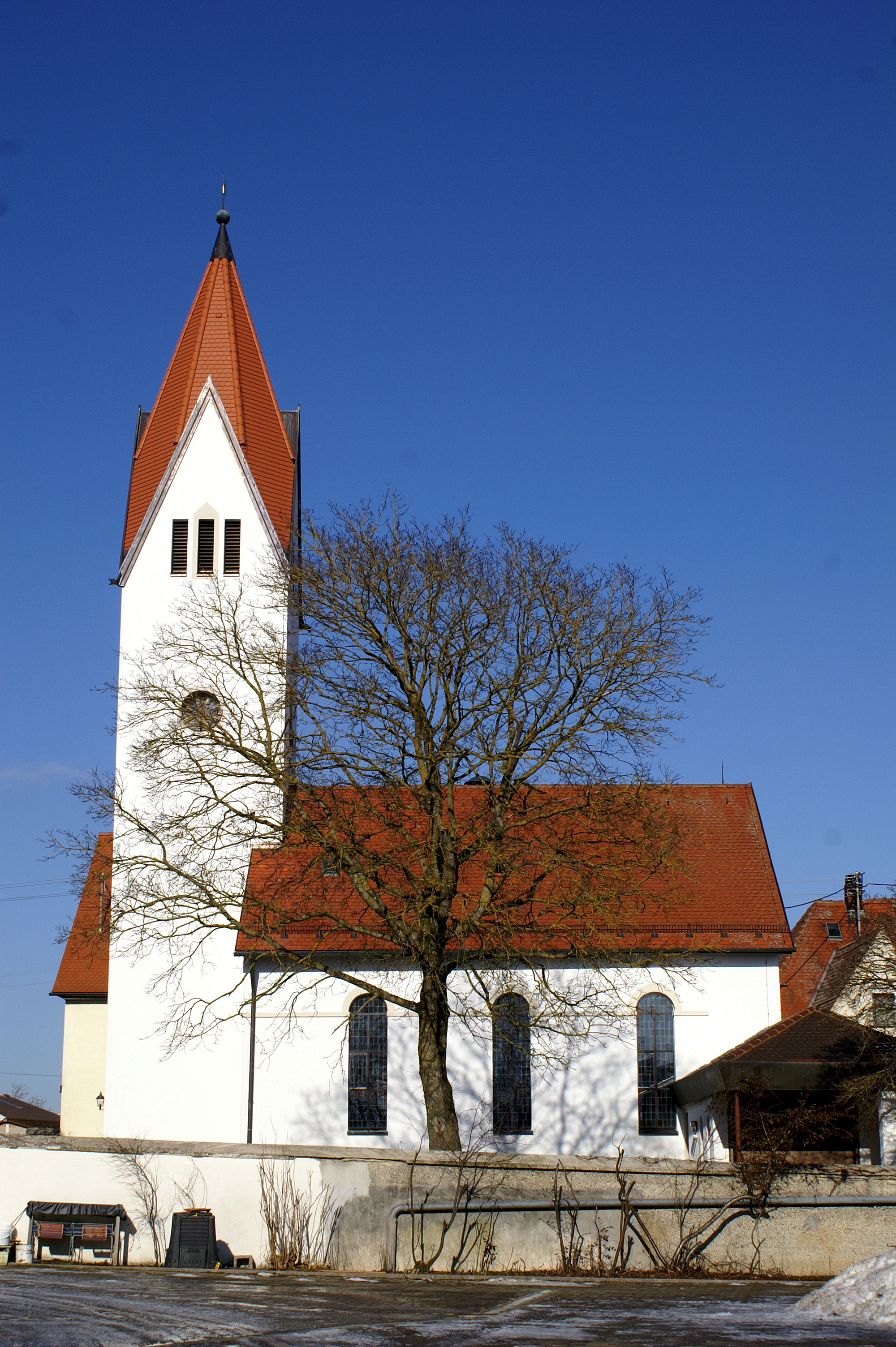 Martinskirche in Radelstetten im Alb-Donau-Kreis